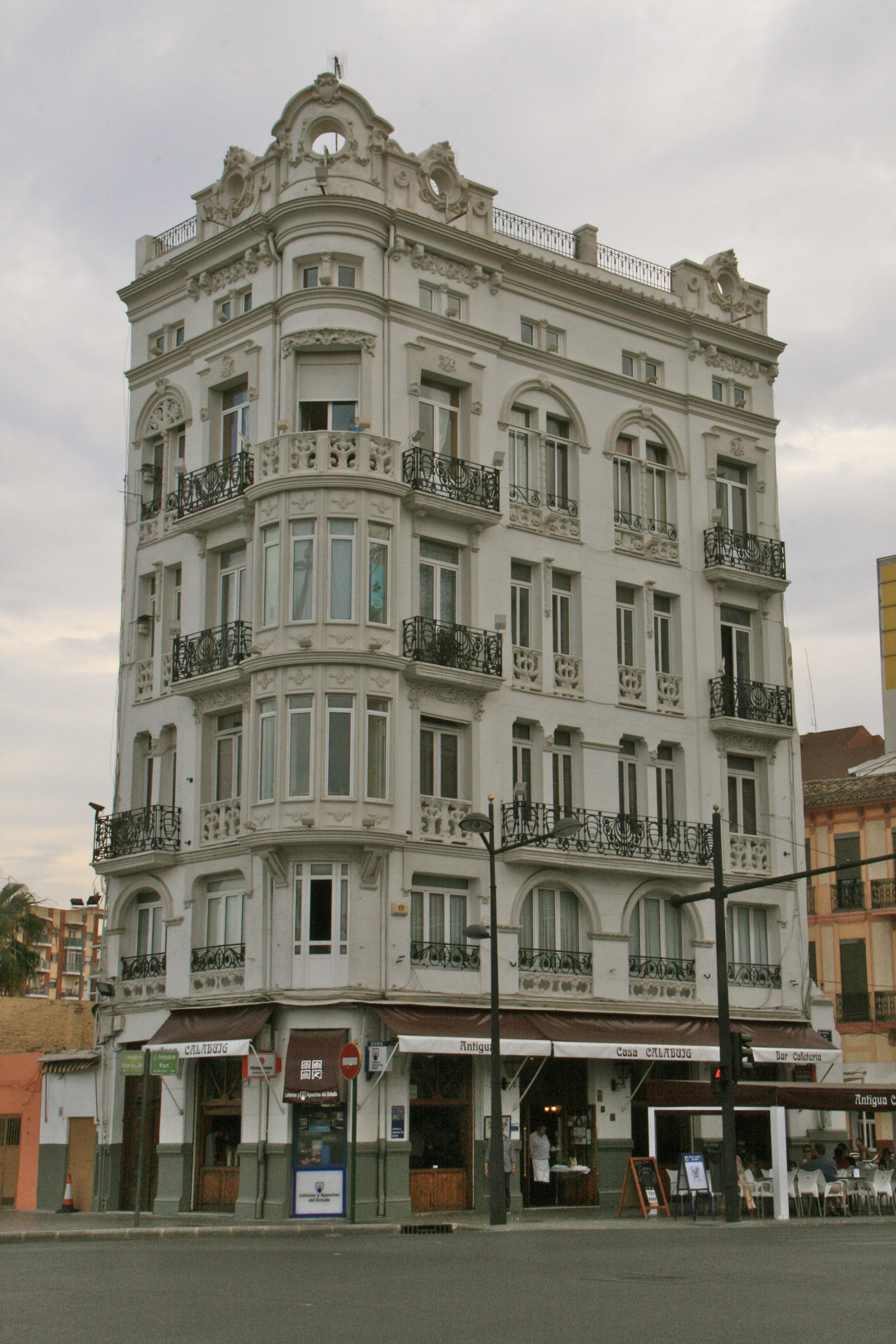 Edificio - Antigua Casa Calabuig